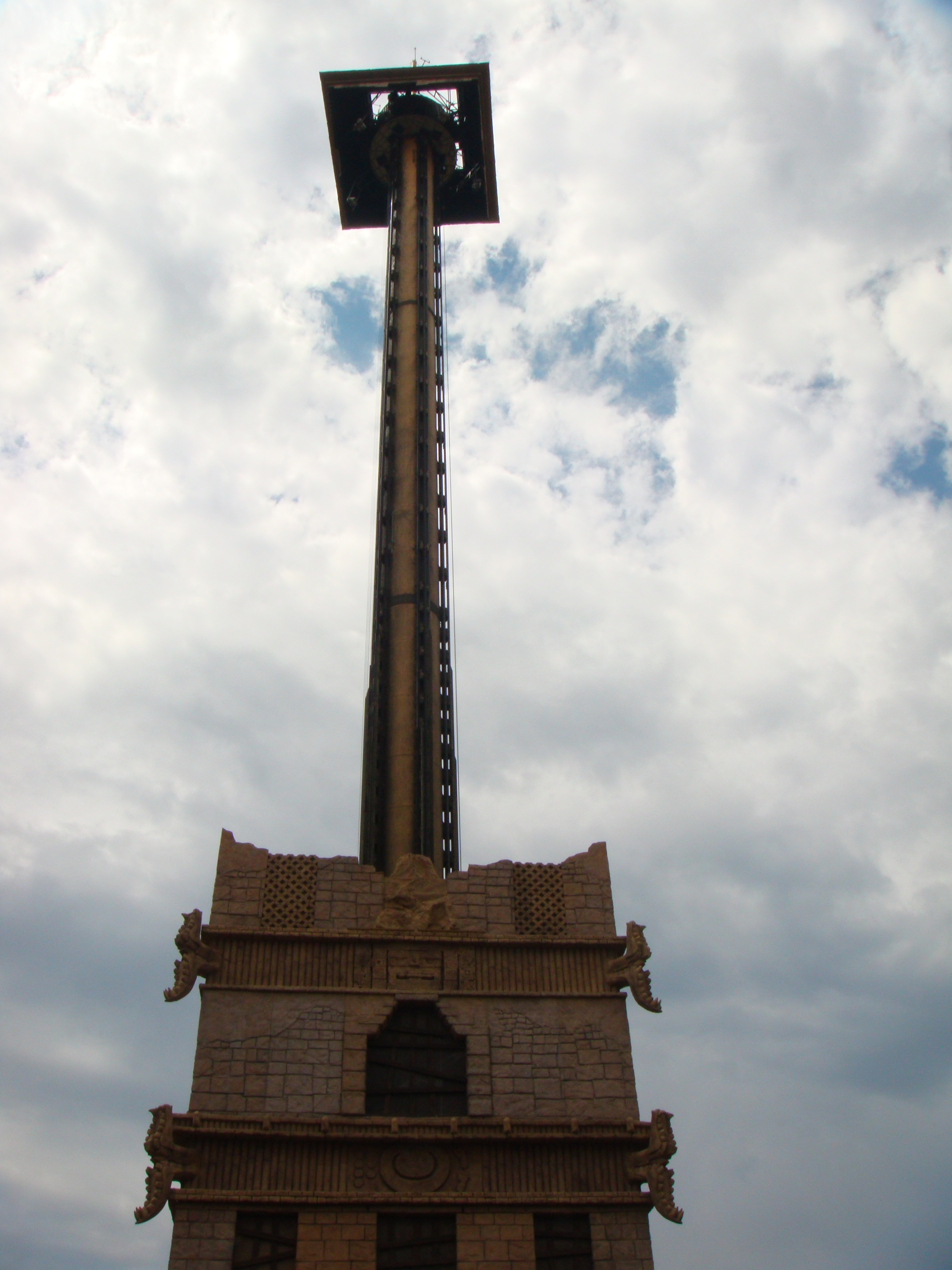 Hurakan Cóndor